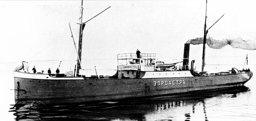 Первый в мире металлический нефтеналивной паровой танкер "Зороастр"